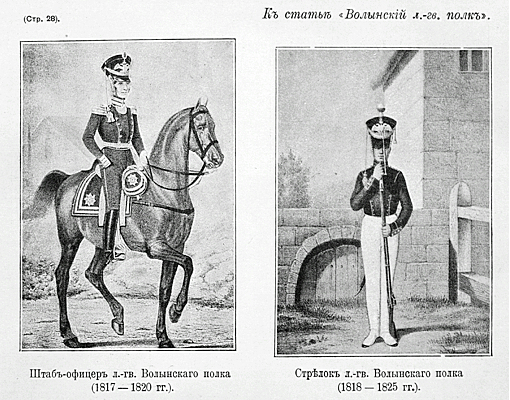 Данная картинка была использована в статье «Волынский лейб-гвардии полк» опубликованной в шестом томе «Военной энциклопедии», который был издан книгоиздательским товариществом Ивана Дмитриевича Сытина в 1912 году в столице Российской империи городе Санкт-Петербурге.